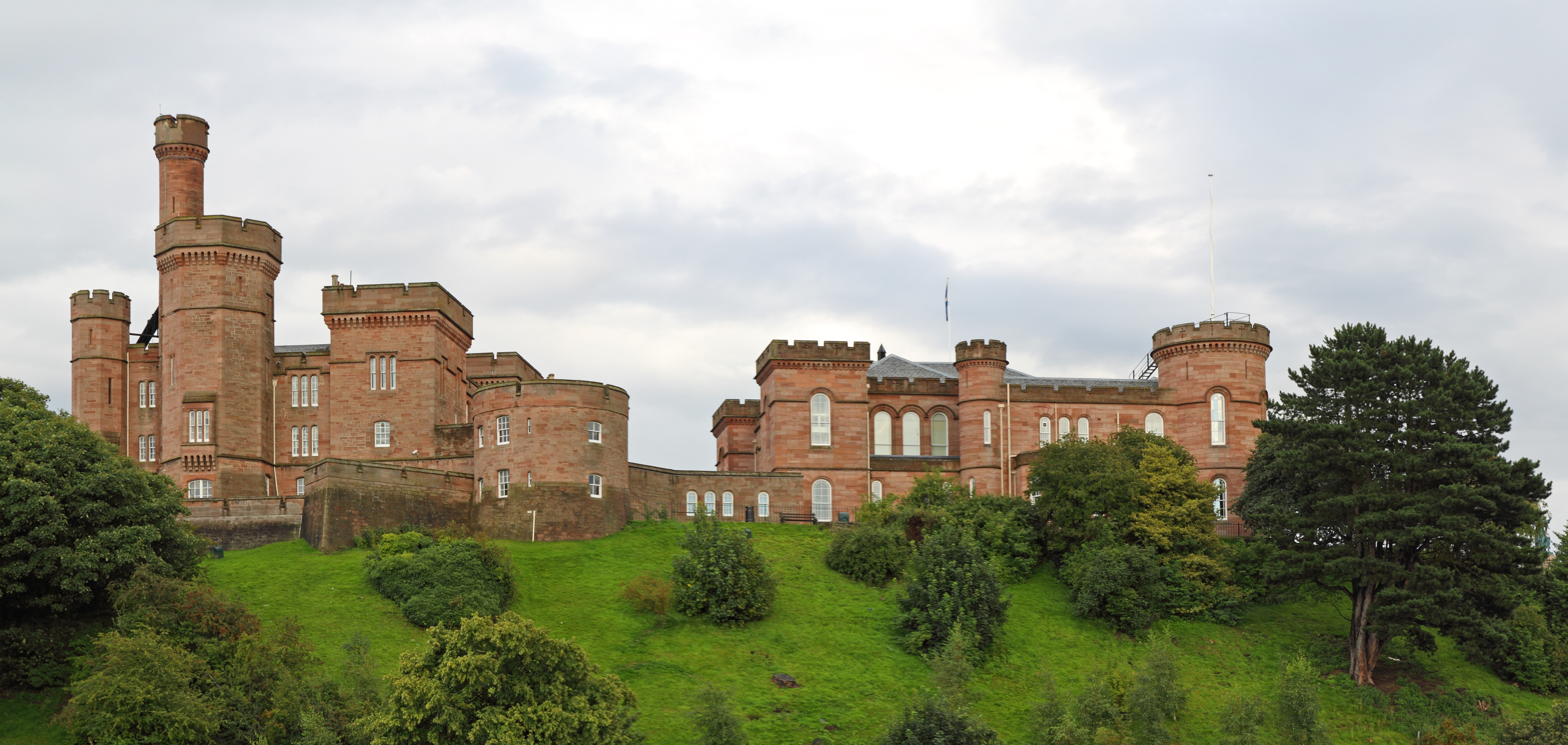 Inverness Castle vom Fluss Ness